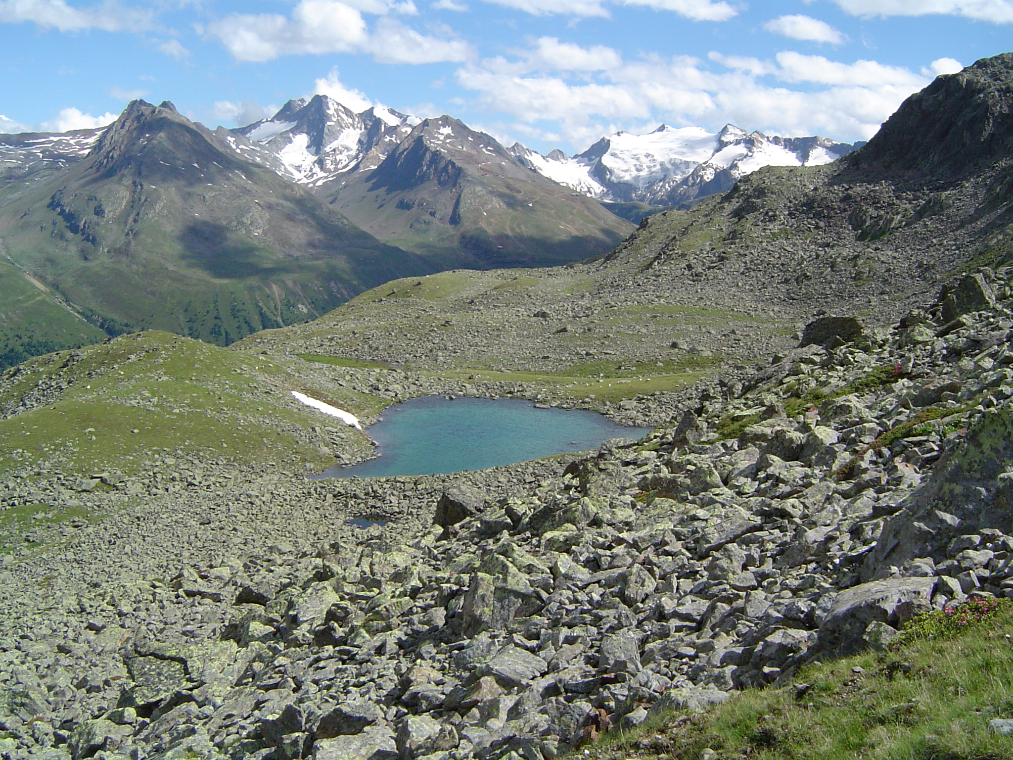 Nedersee (am Nederkogel-Gipfel), Ötztaler Alpen. Im Hintergrund der Gurgler Kamm mit Granatenkogel, Liebenerspitze und Hinterem Seelenkogel.